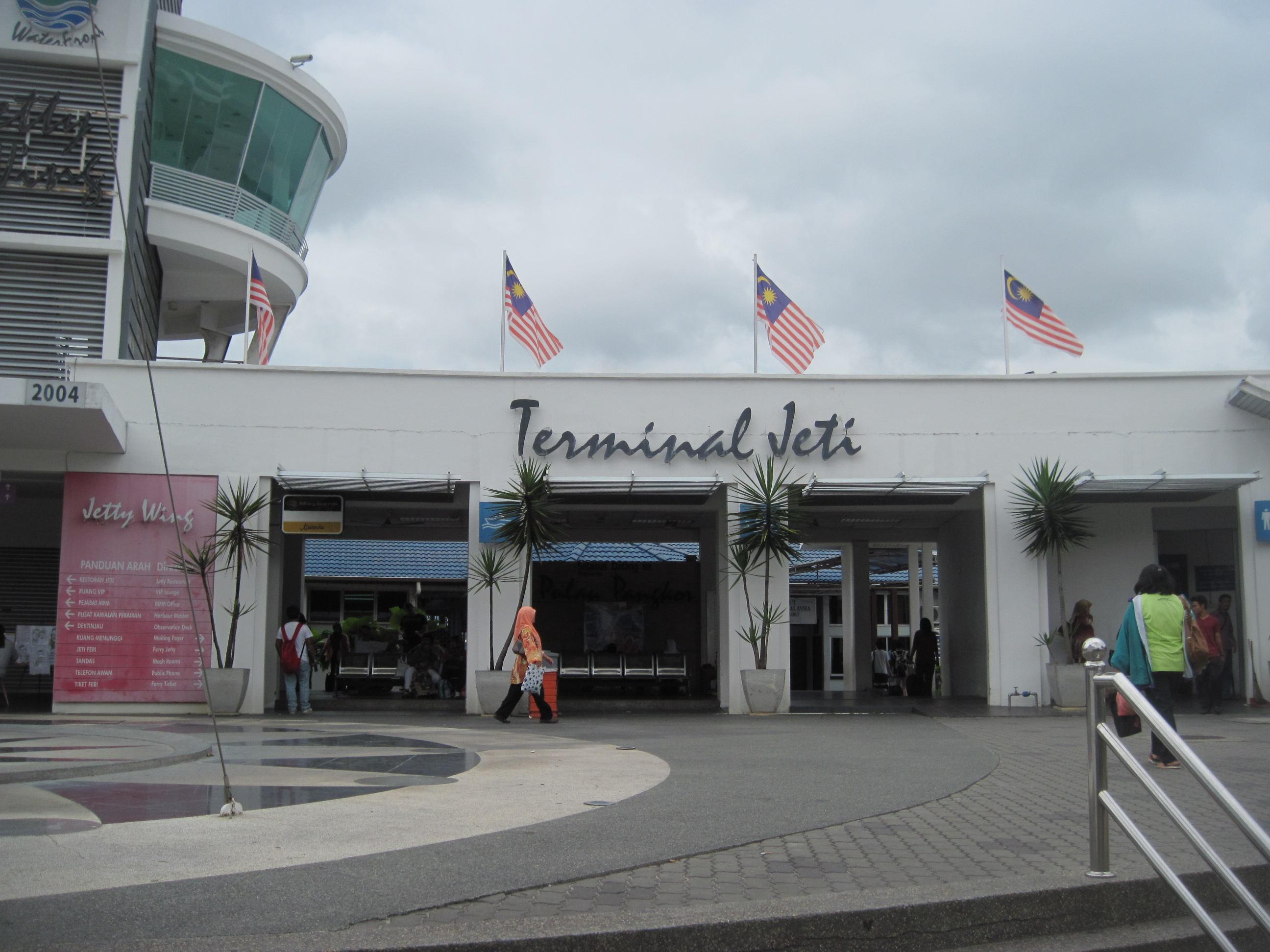 Jeti ke Pulau Pangkor.